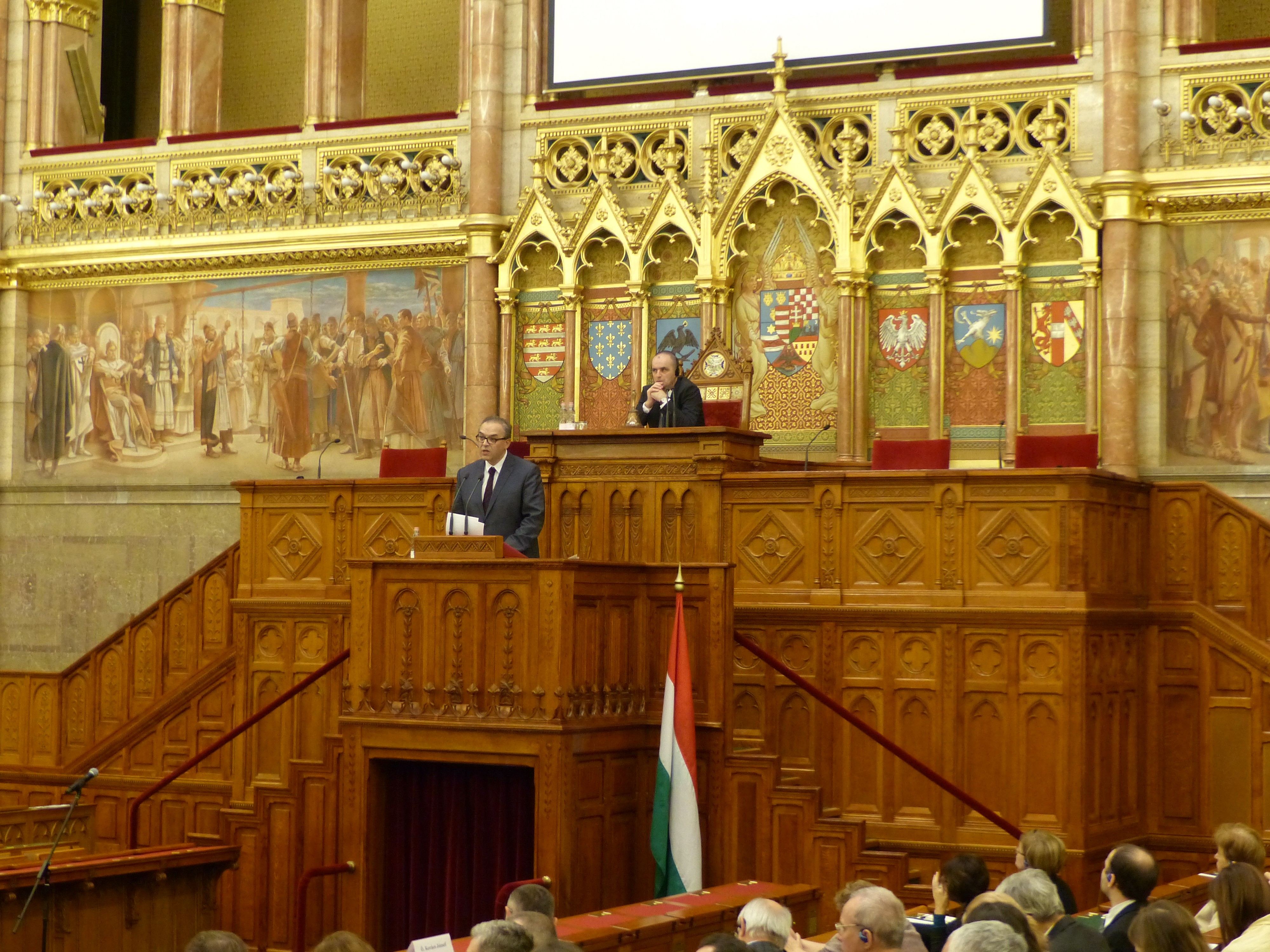 Maciej Korkuć (Nemzeti Emlékezet Intézete, Krakkó) A lehetetlen küldetés Stanislaw Mikolajczyk címmel tartott előadást a Felsőházban a Sztálin árnyékában - A szovjet modell exportja Kelet-Közép-Európában című konferencián.